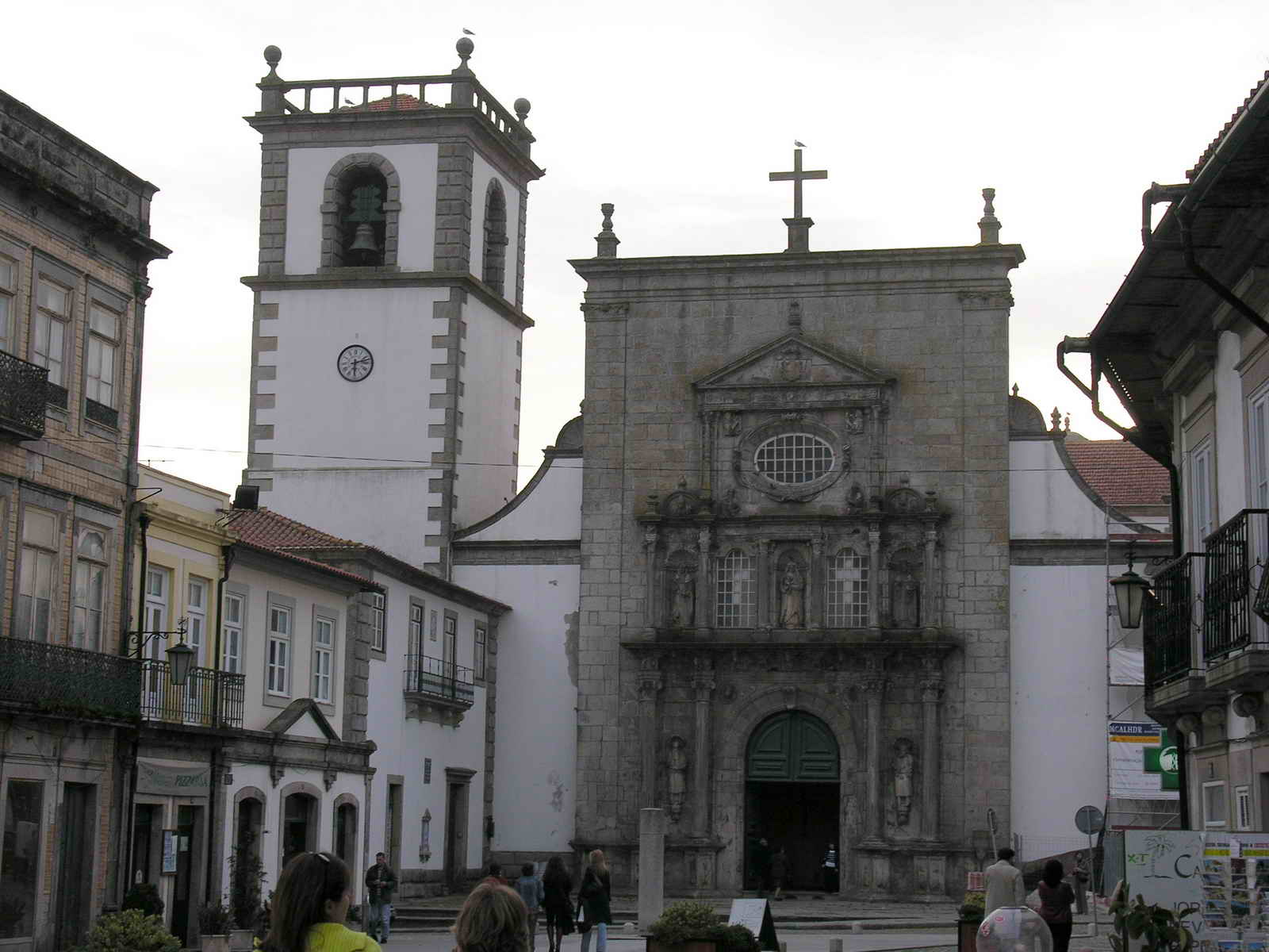 Igreja de Santa Cruz do antigo convento de São Domingos, desenhada pelo arquitecto português Mateus Lopes iniciada em 1566 e concluída em 1571. Viana do Castelo